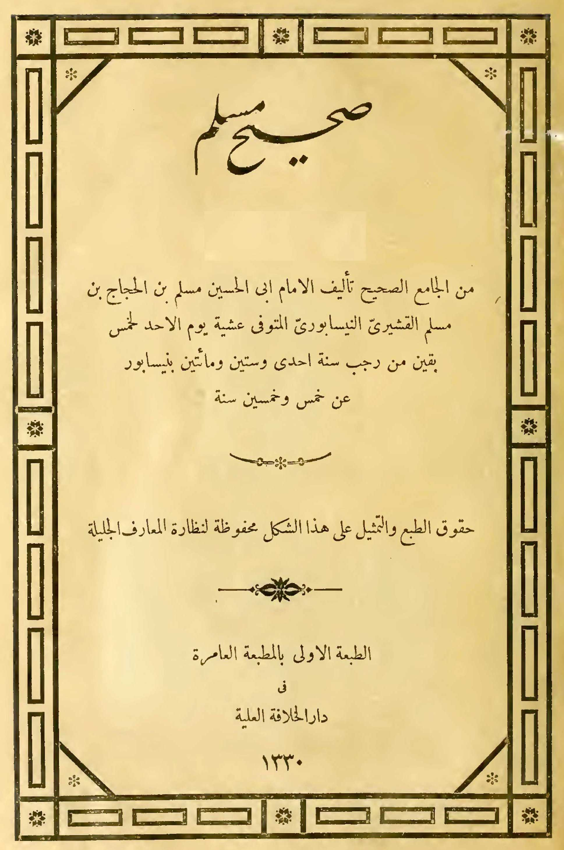 تصنيف:كتب الحديث تصنيف:كتب أهل السنة والجماعة تصنيف:أغلفة كتب